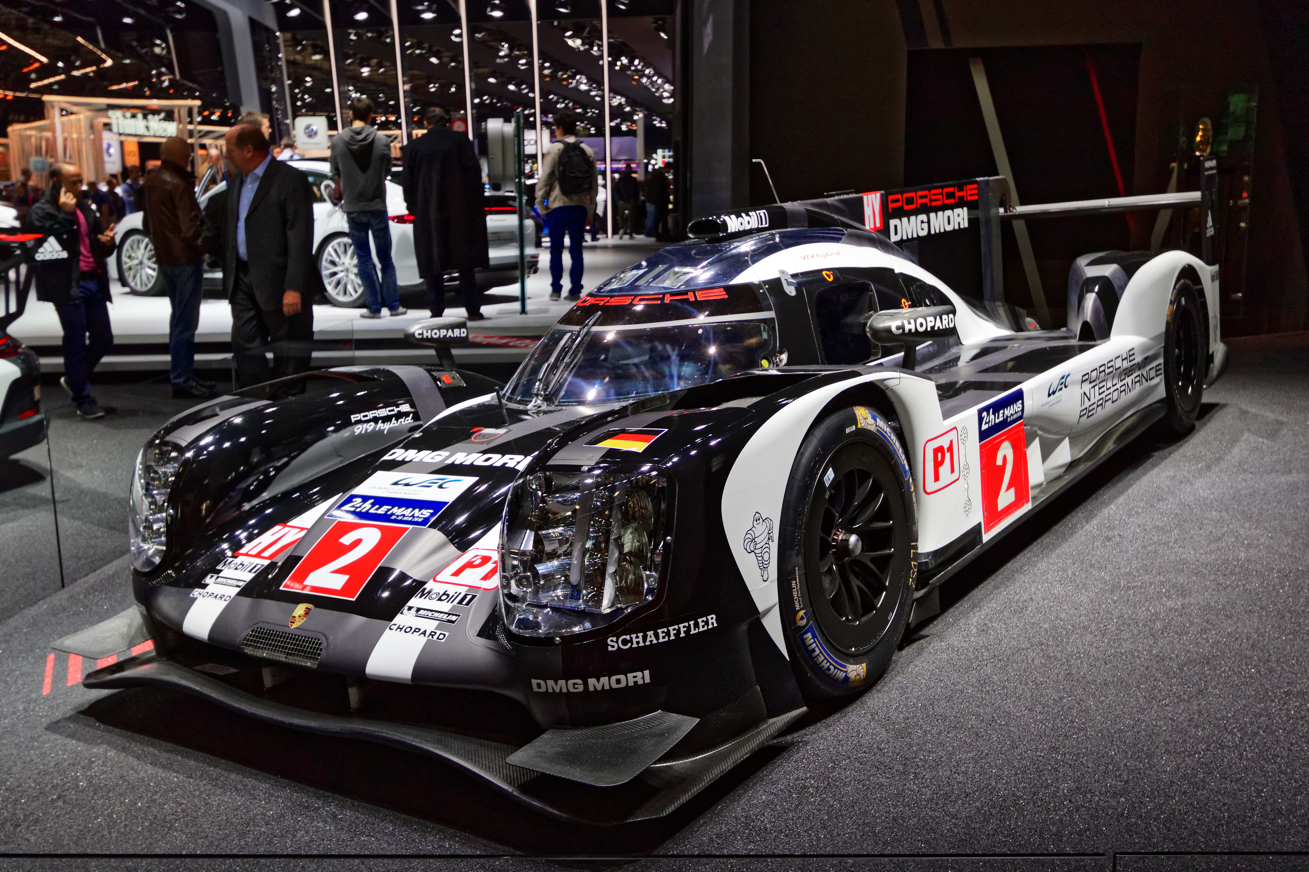 Une Porsche 919 Hybrid présentée lors du mondial de l'automobile de Paris 2016.